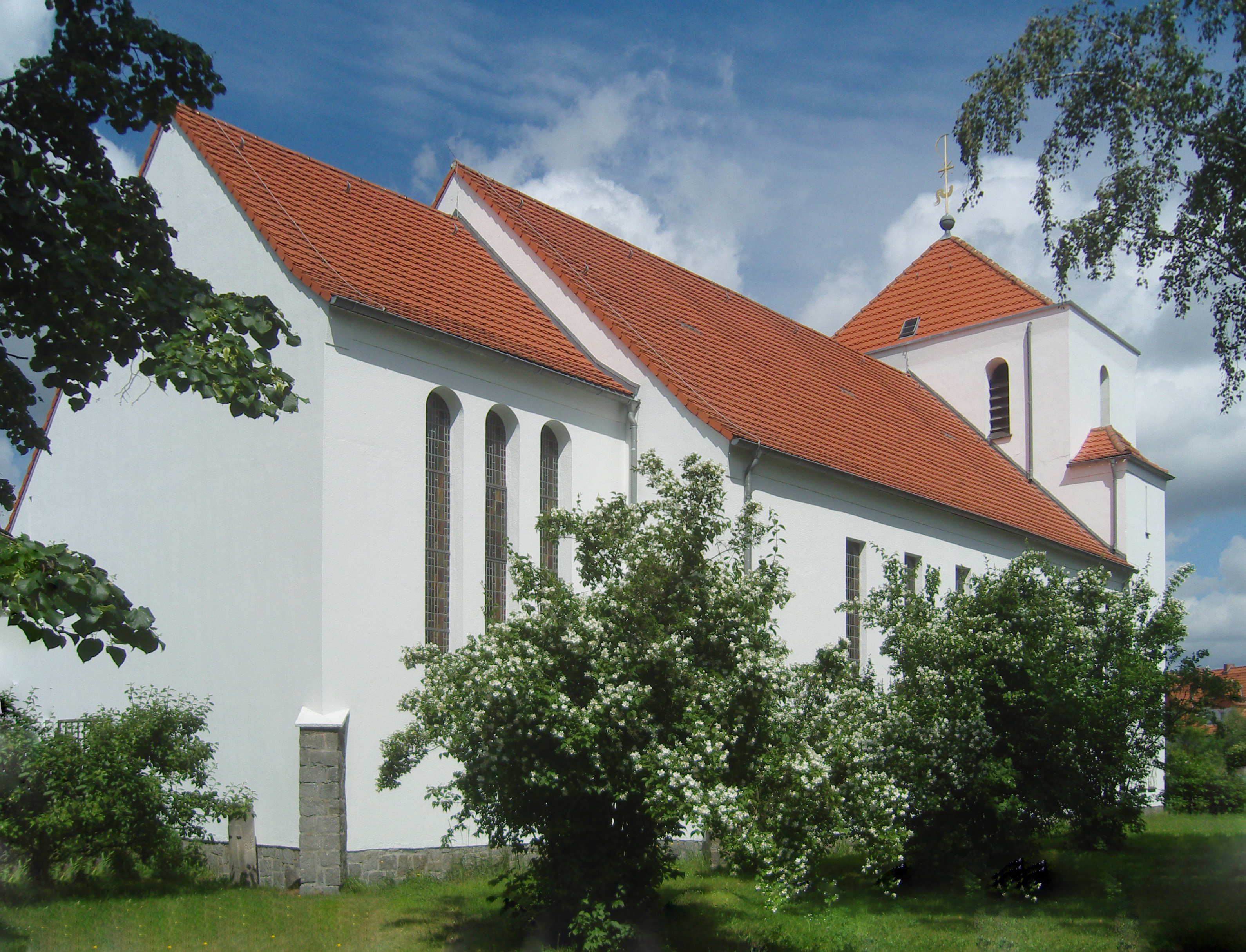 Katholische Heilig-Kreuz-Kirche in Schwarzheide; Baudenkmal